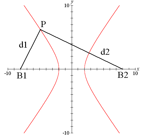 tekening hyperbool (gemaakt met GraphEq)